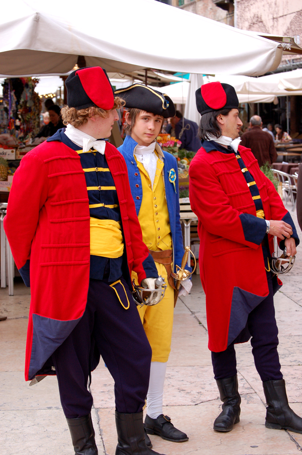 Milizie venete a Verona (in rosso gli Schiavoni e in oro-azzurro la Guardia Nobile Veronese)